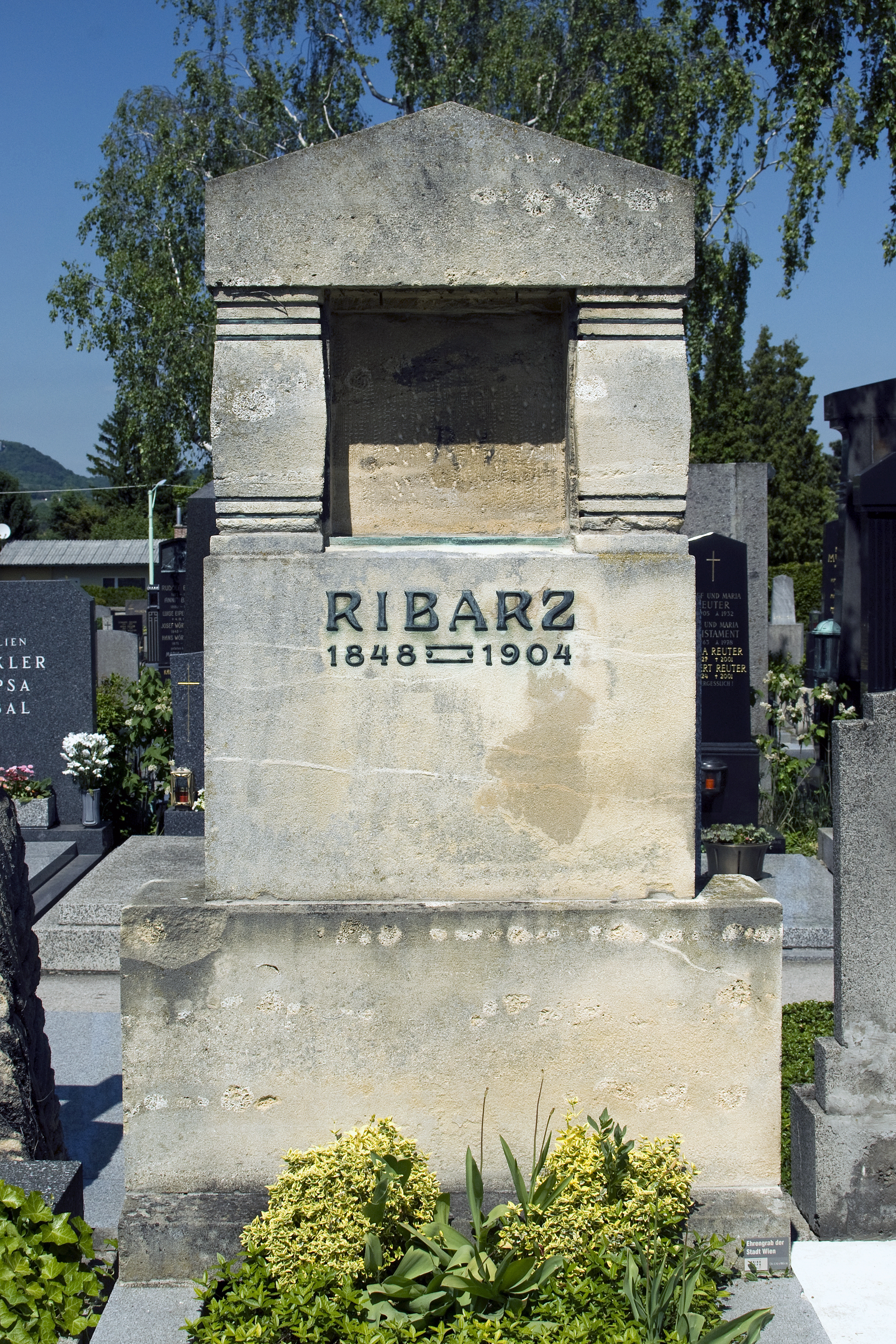 Grab Rudolf Ribarz, Landschaft und Blumenmaler